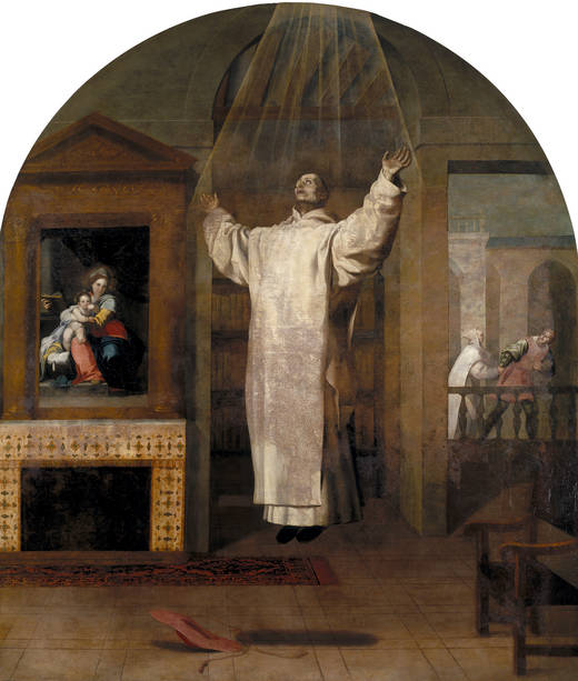 El éxtasis de Jean Birellelabel QS:Les,"El éxtasis de Jean Birelle"